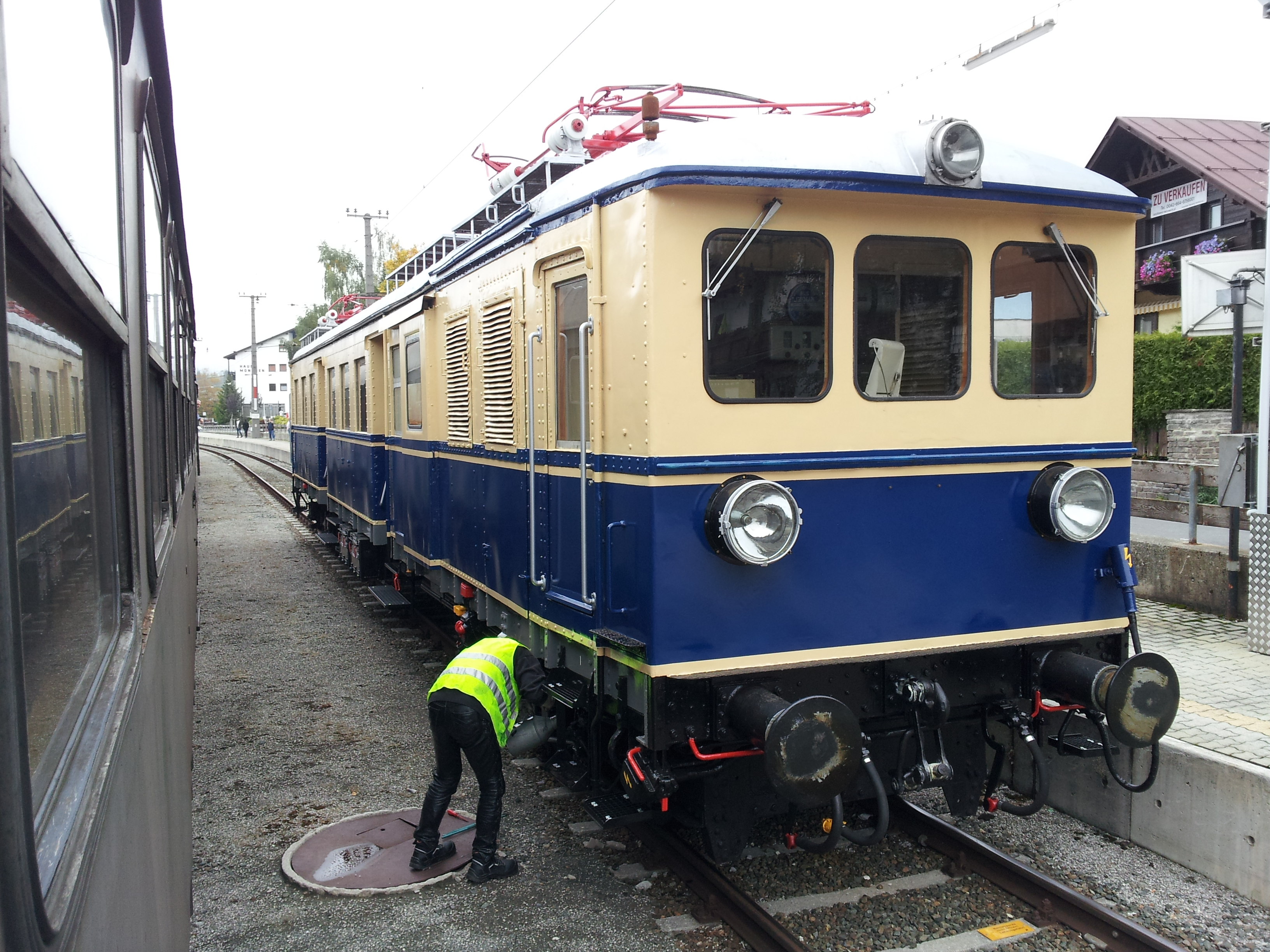 Bahnhof Seefeld, ÖBB 4041 (anlässlich des 100-jährigen Jubiläums der Mittenwaldbahn)